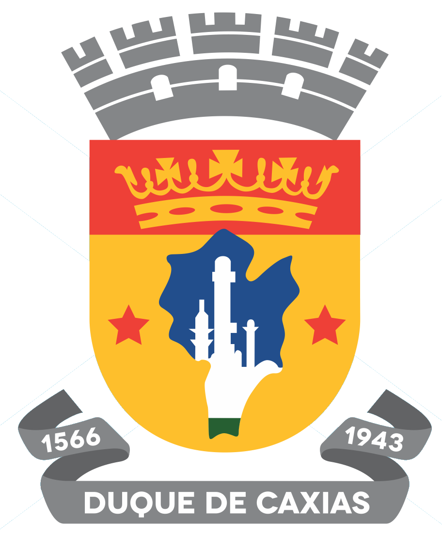 brasão utilizado pela prefeitura municipal